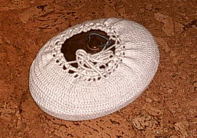 Alte kupferne Wärmflasche, zum Schutz des Benutzers umhäkelt, selbst fotografiert, März 2006